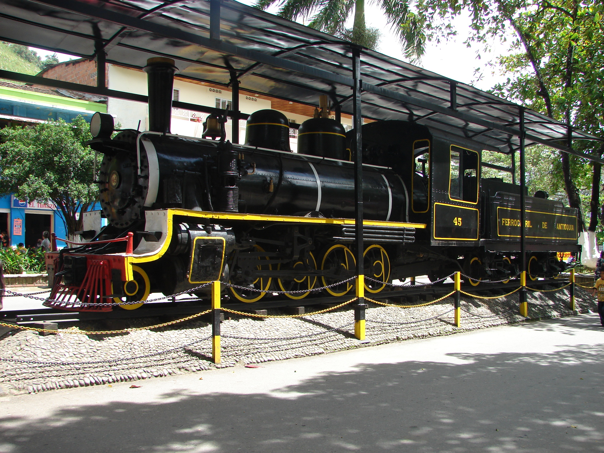 Antigua Locomotora en el Municipio de Cisneros, Antioquia, Colombia.CISNEROS - ANTIOQUIA